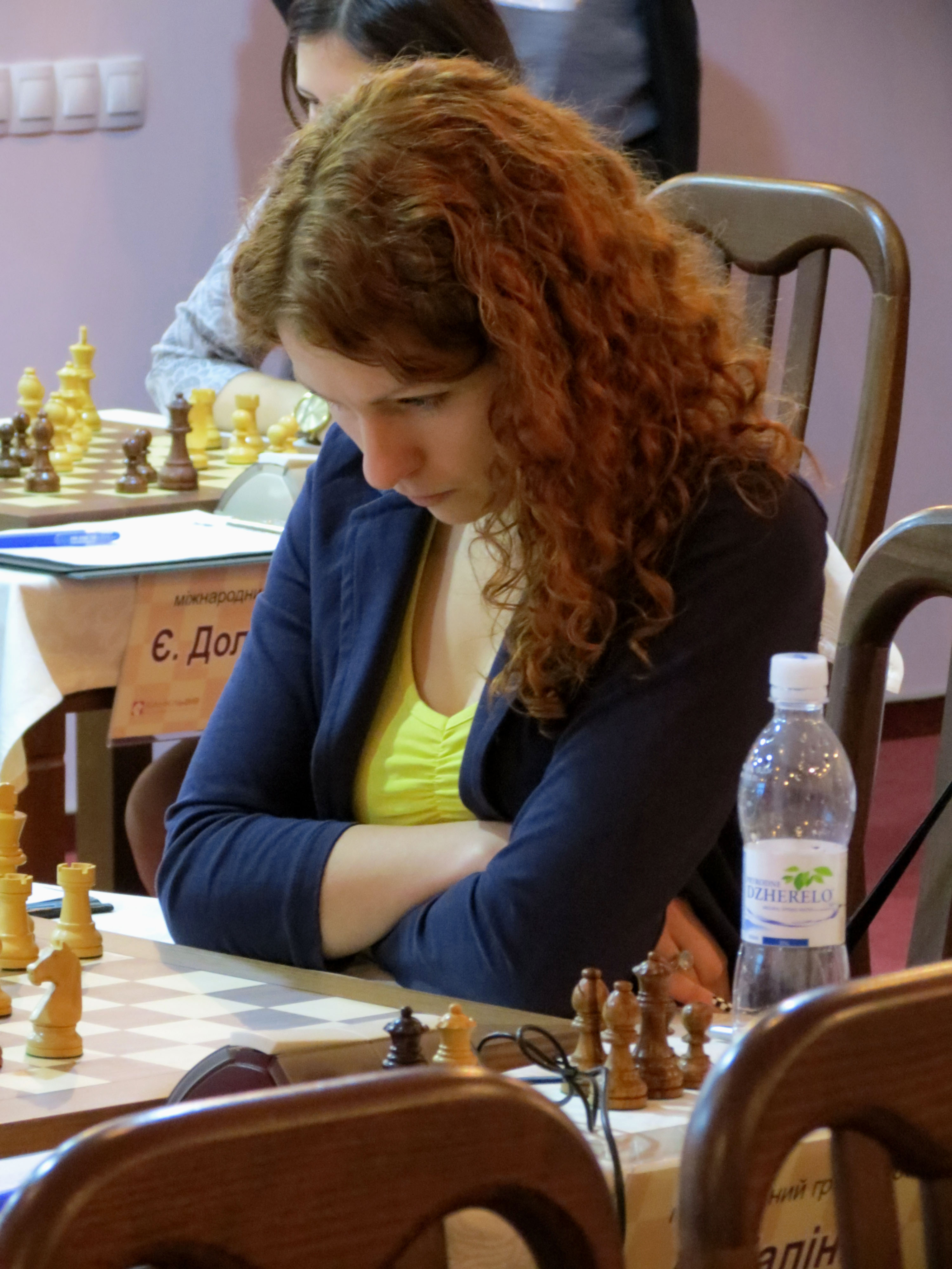 Ольга Олеговна Калинина